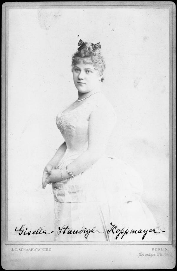 Gisela Staudigl (1864-1929), österreichische Sängerin (Mezzosopran)